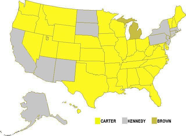 1980 Democratic presidential primaries